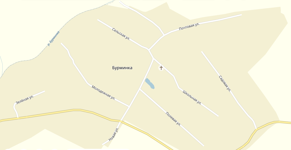 Карта Бурминка